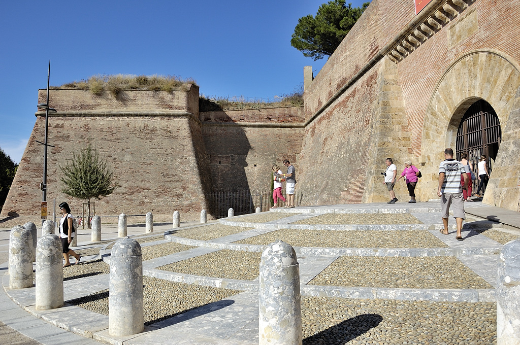 Place du Docteur René Puig